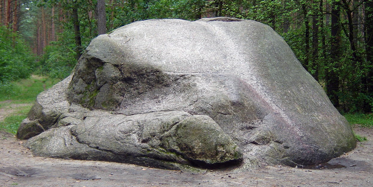 Głaz narzutowy "Kamień św. Wojciecha" niedaleko wsi Leosia